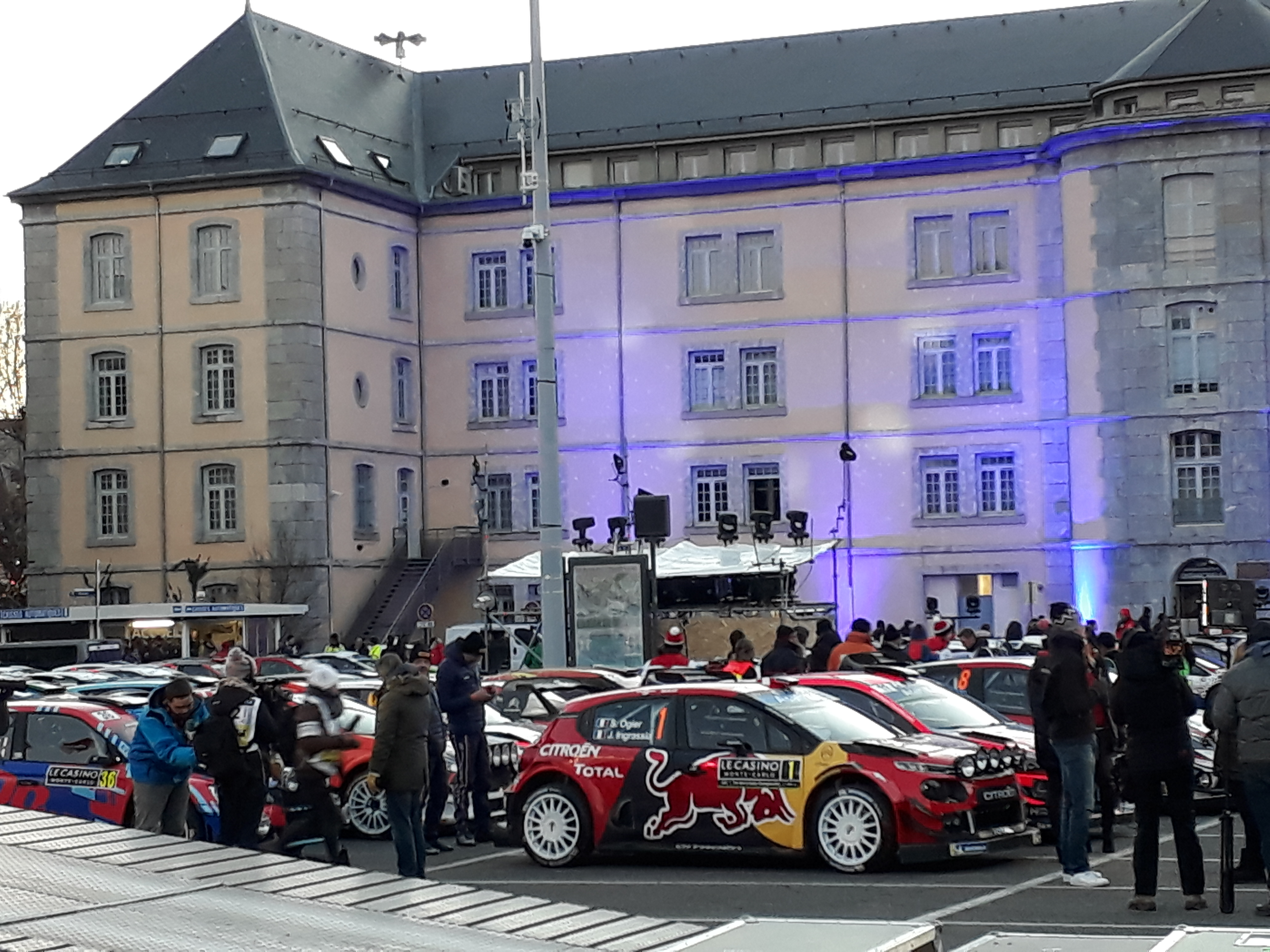 Citroën C3 WRC de Sébastien Ogier au départ du Rallye Monte-Carlo 2019.